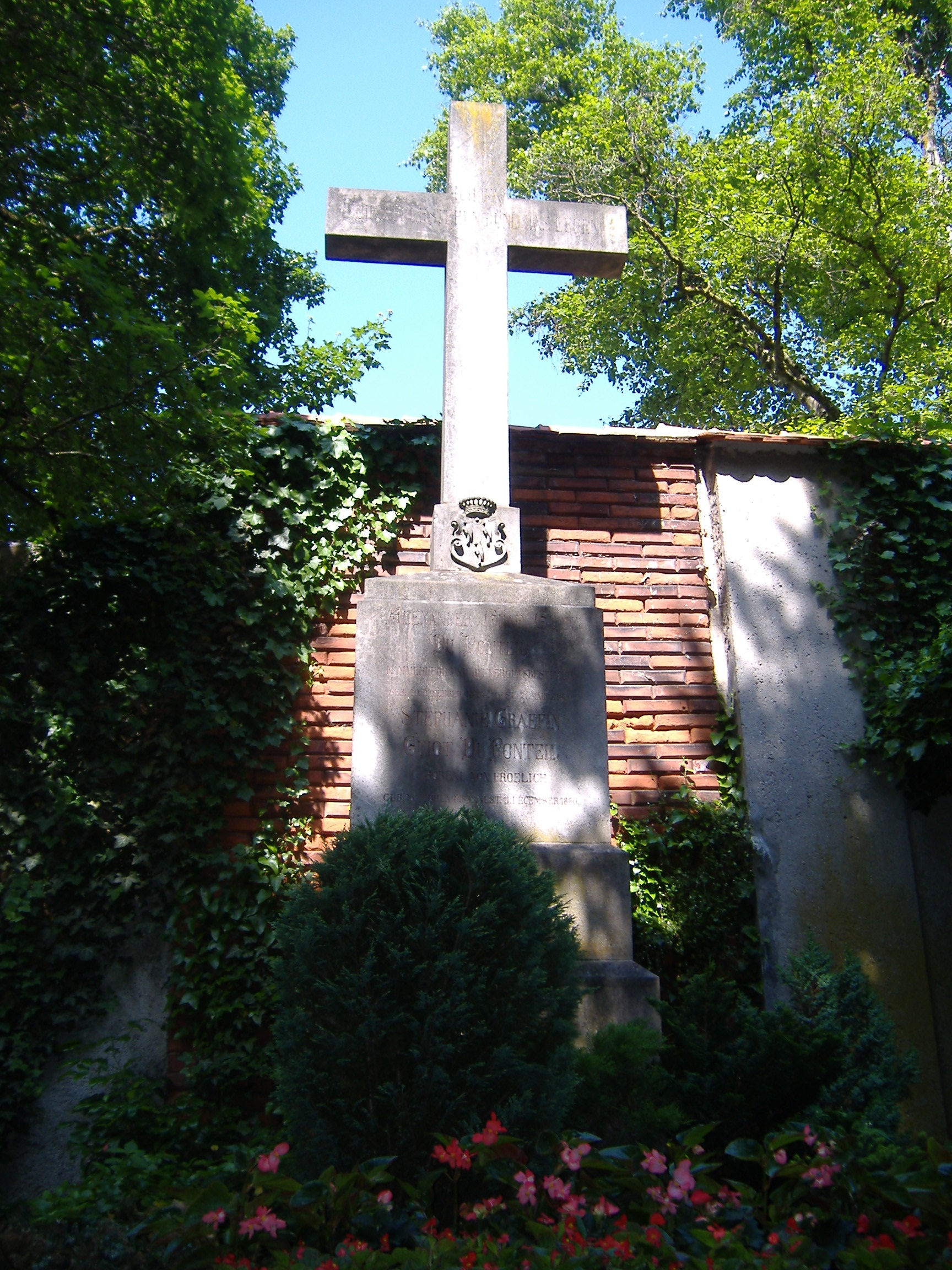 Grabstätte Gräfin Stephanie du Ponteil